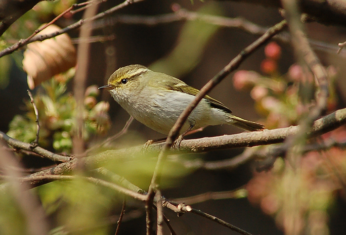 Phylloscopus proregulus, 贵阳药用植物园